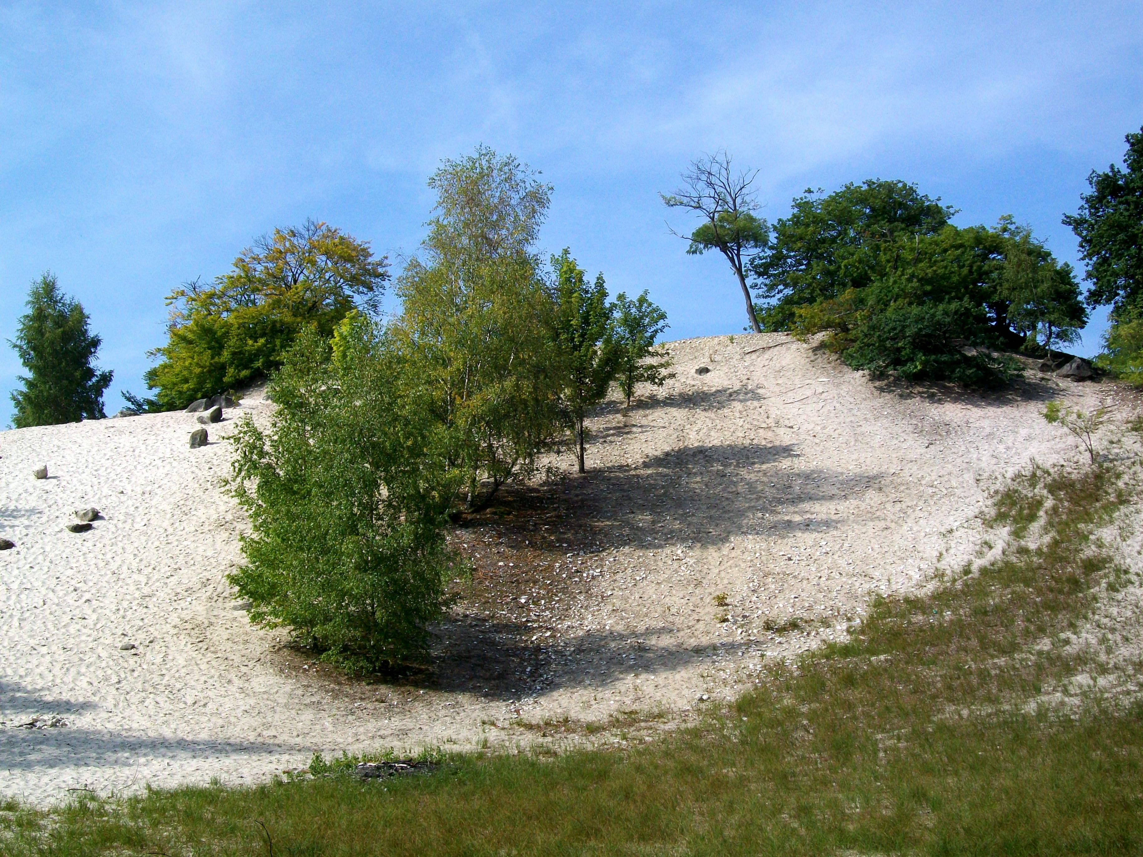 La butte d'Aumont (124 m) à Aumont-en-Halatte (60) s'apparente à une grosse dune.